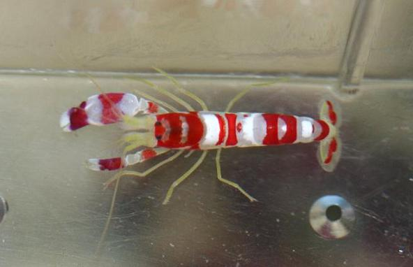 Randalls Knallkrebs (Alpheus randalli)